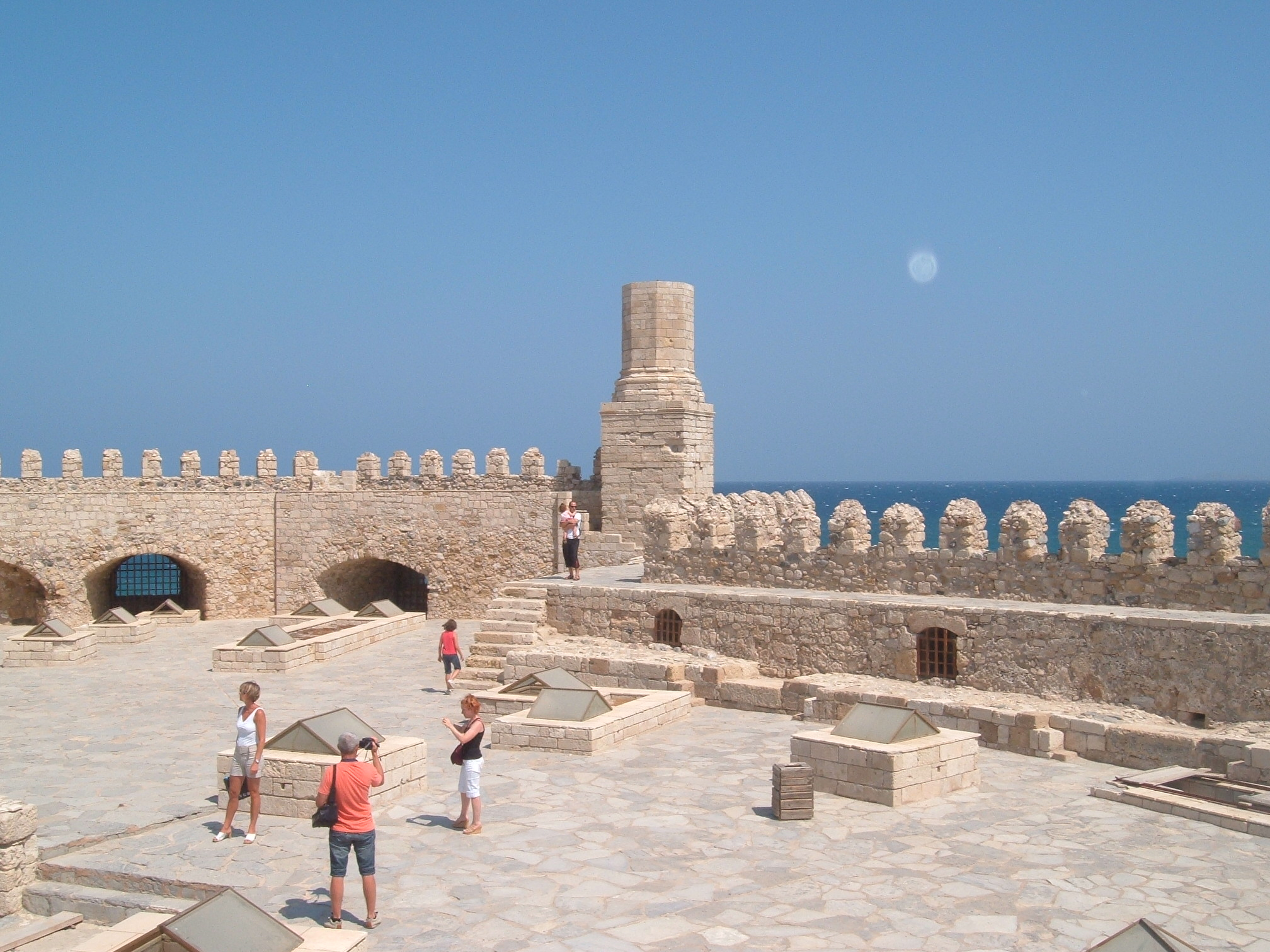 Forteresse vue d'en haut